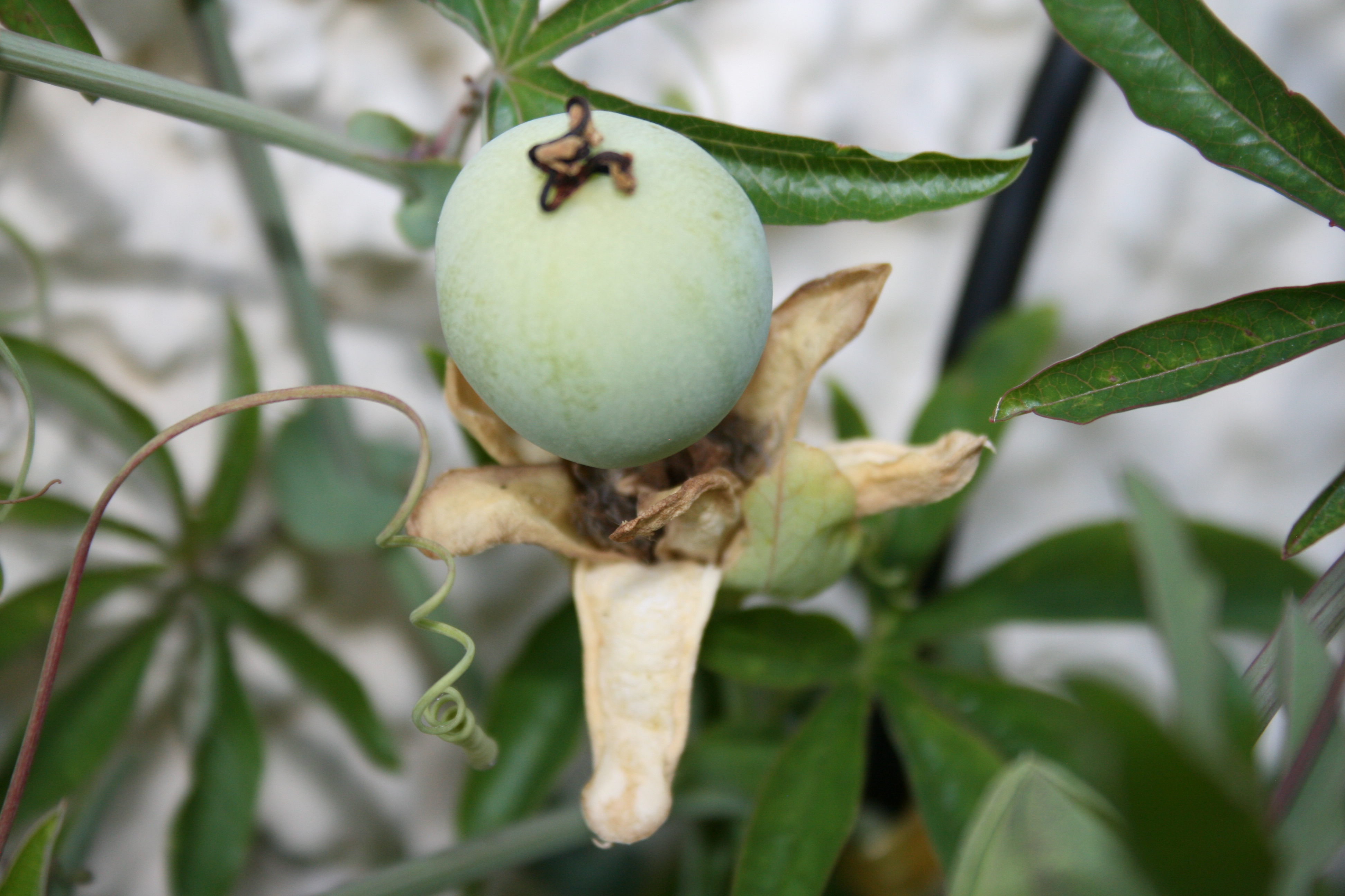 Frucht der Passionsblume